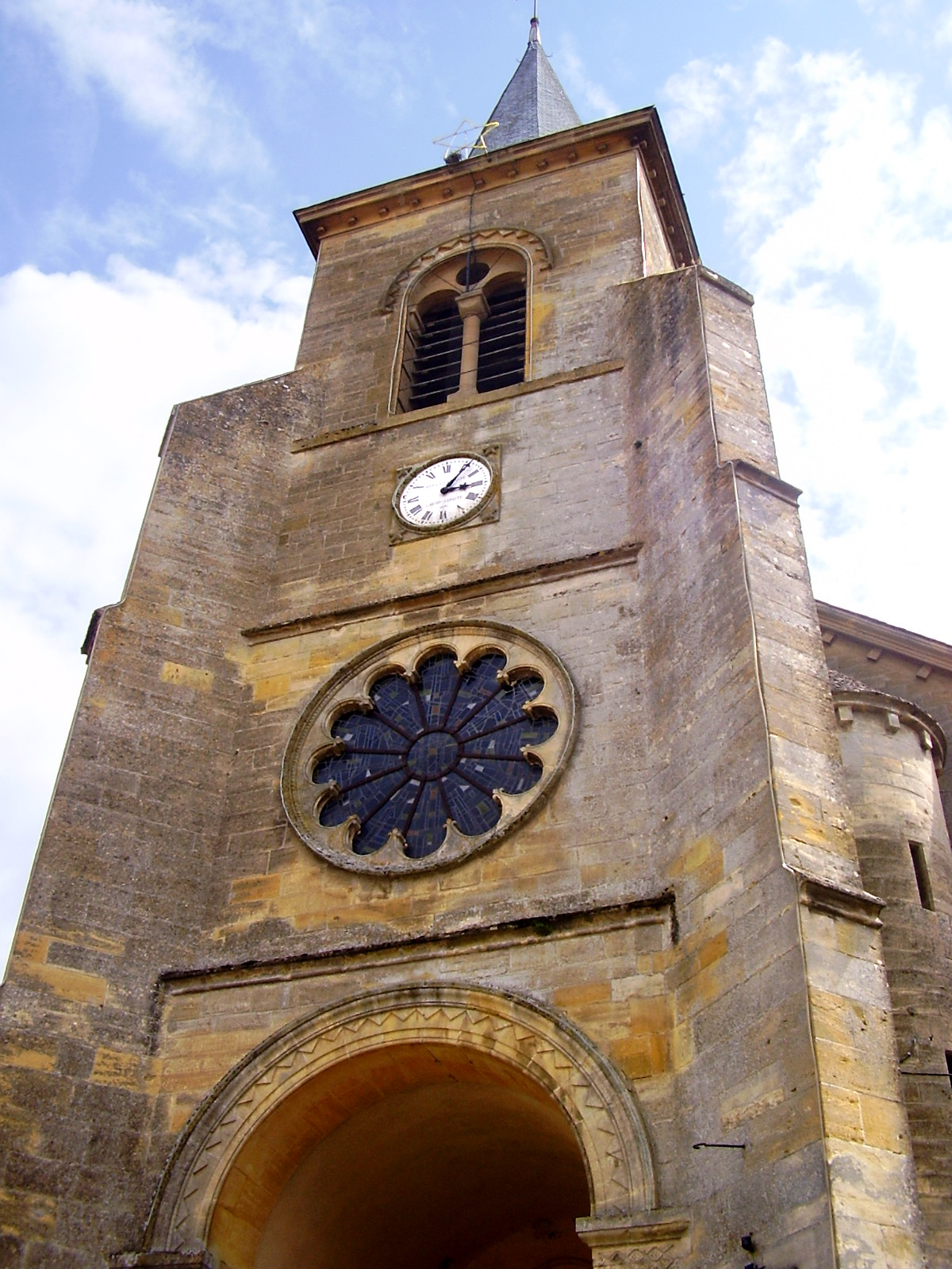 Eglise de Thonne-la-Long, Meuse